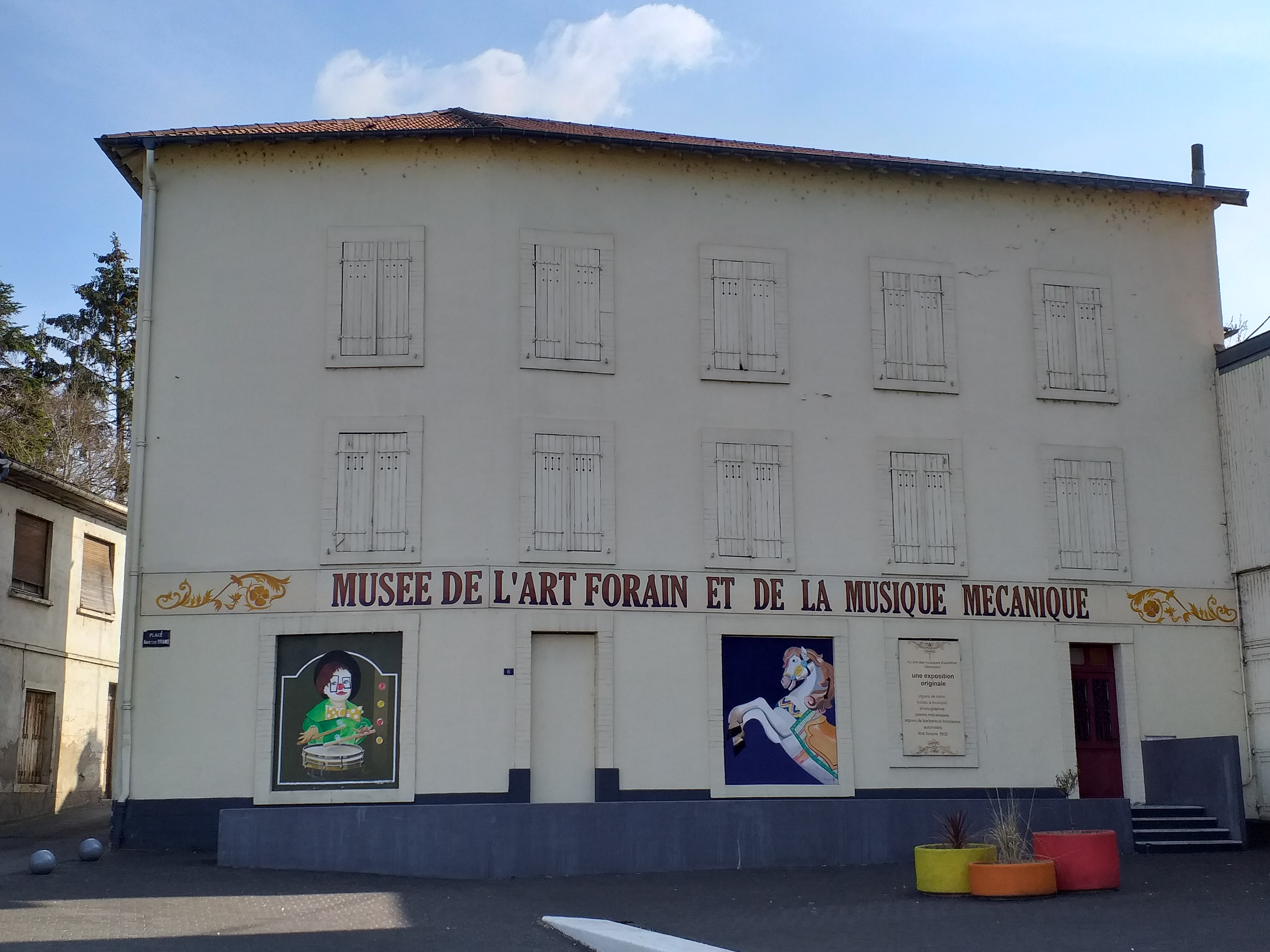 Conflans en Jarnisy Musée de l'art forain et de la musique mécanique